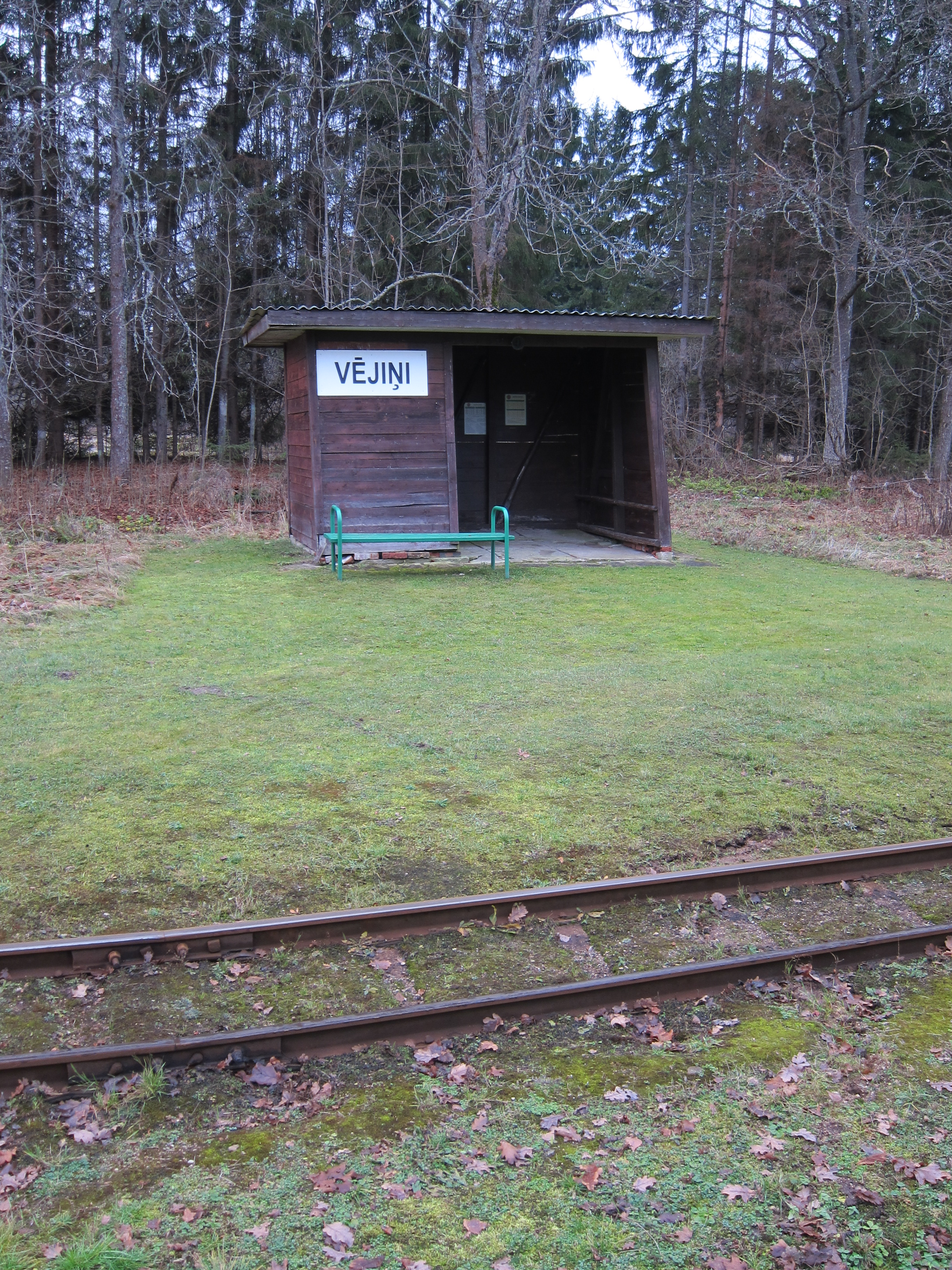 Vējiņu pietura